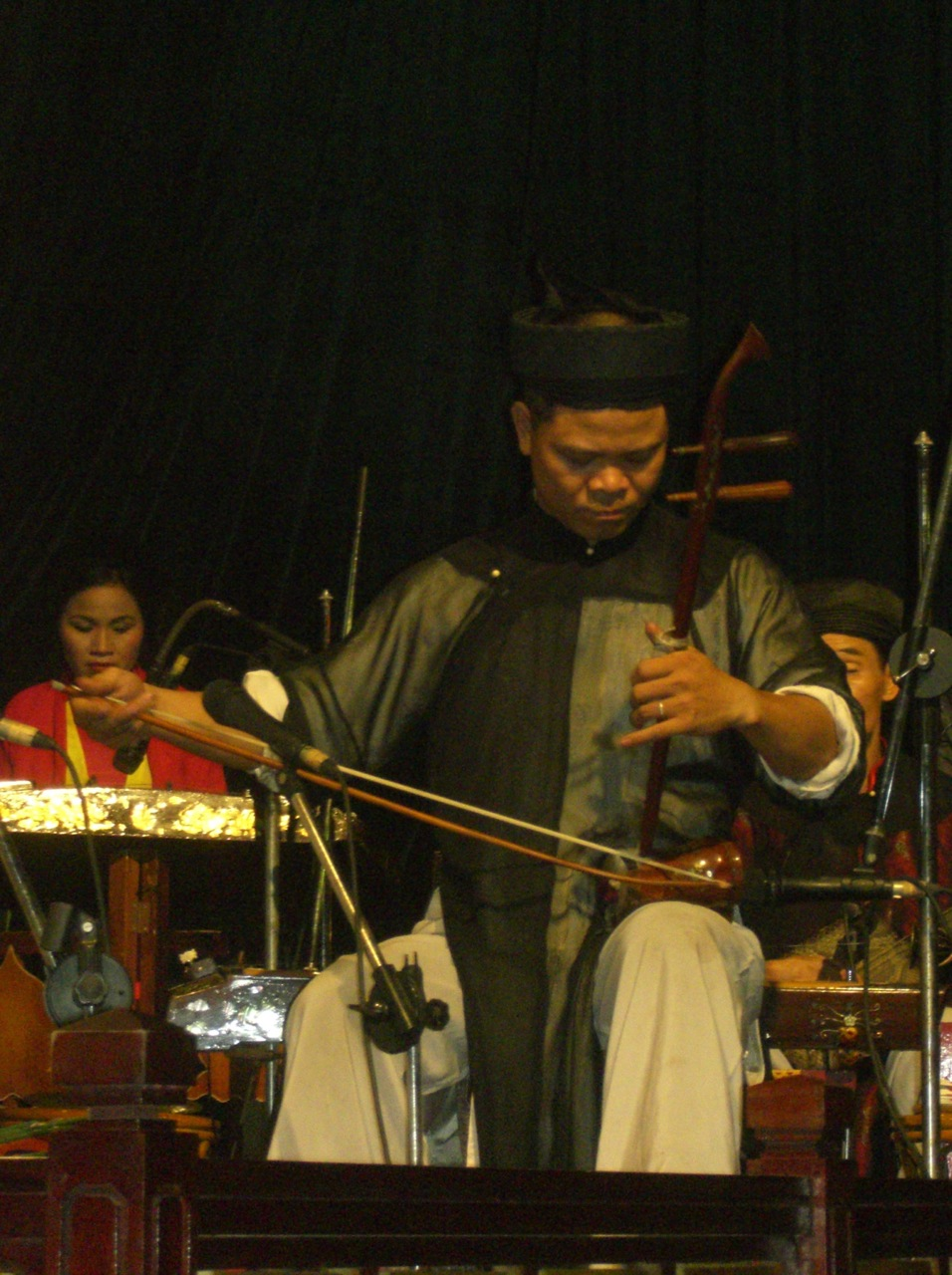 A player of đàn nhị, Hanoi, Vietnam.